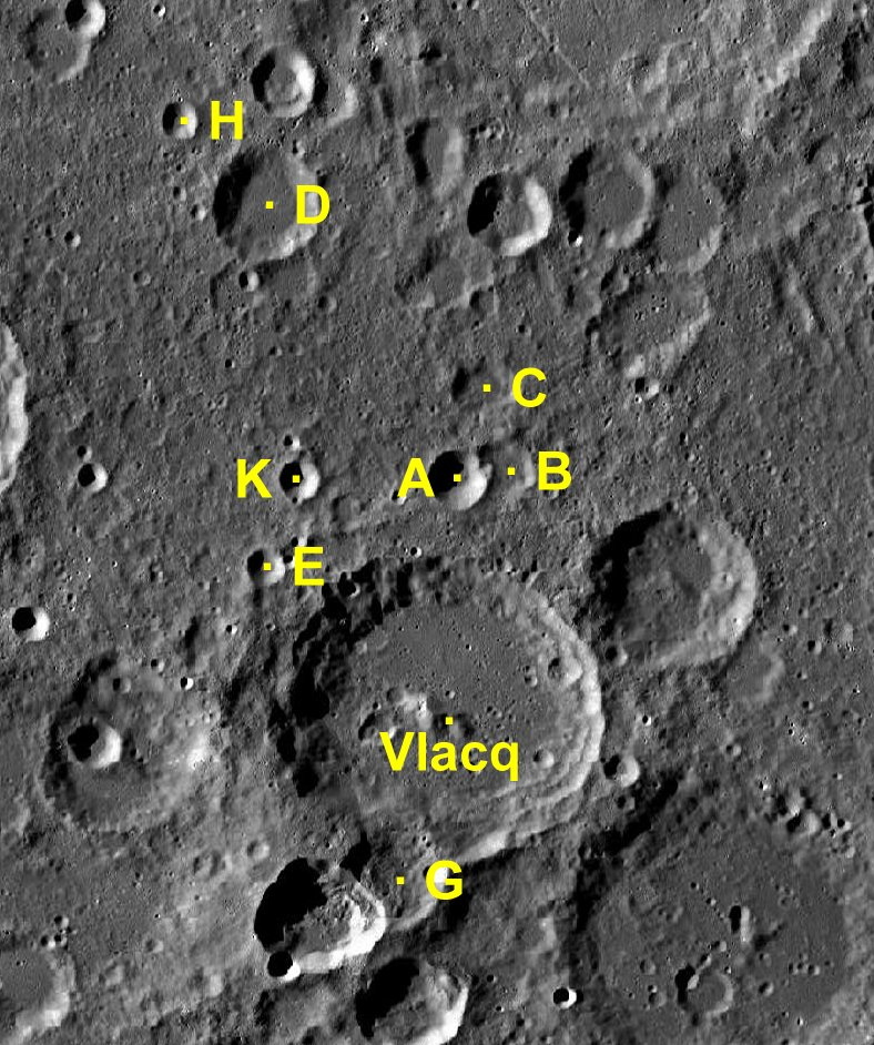 Cráter lunar Vlacq. Cráteres satélite. (Imagen LRO)